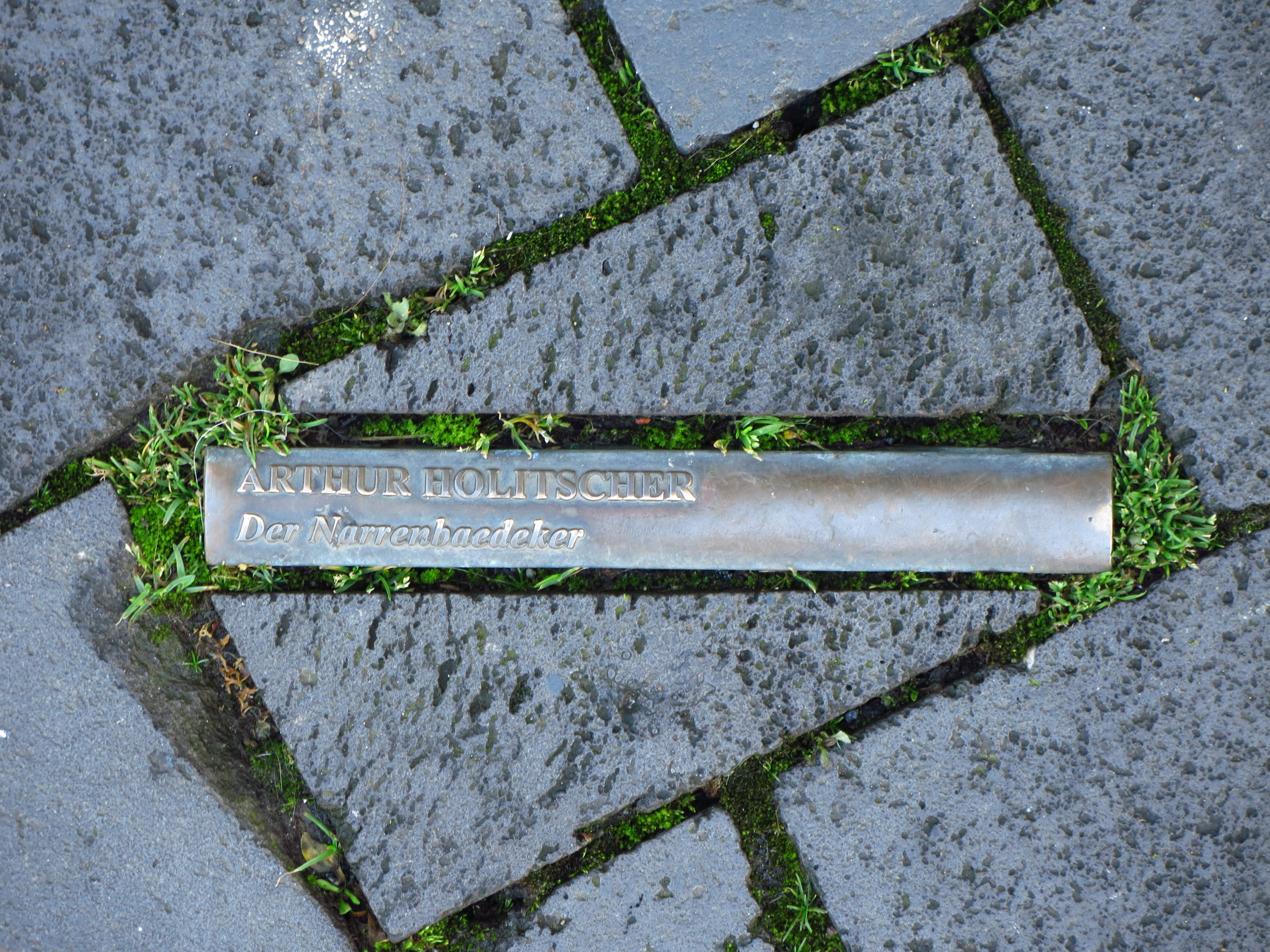 Das Mahnmal zur Bücherverbrennung auf dem Bonner Markt; In das Pflaster des Bonner Markt sind insgesamt 60 sichtbare Buchrücken, sogenannte „Lesezeichen“, verteilt, die sich an der Rathaustreppe, dem Ort an dem die Bücher am 10. Mai 1933 verbrannt wurden, verdichten. Zusätzlich wurde ein wetterfester Archiv-Behälter in Form einer Büchertruhe in den Platz eingelassen. Seine Inschrift benennt das Ereignis und weitere Autoren von verbrannten Büchern.